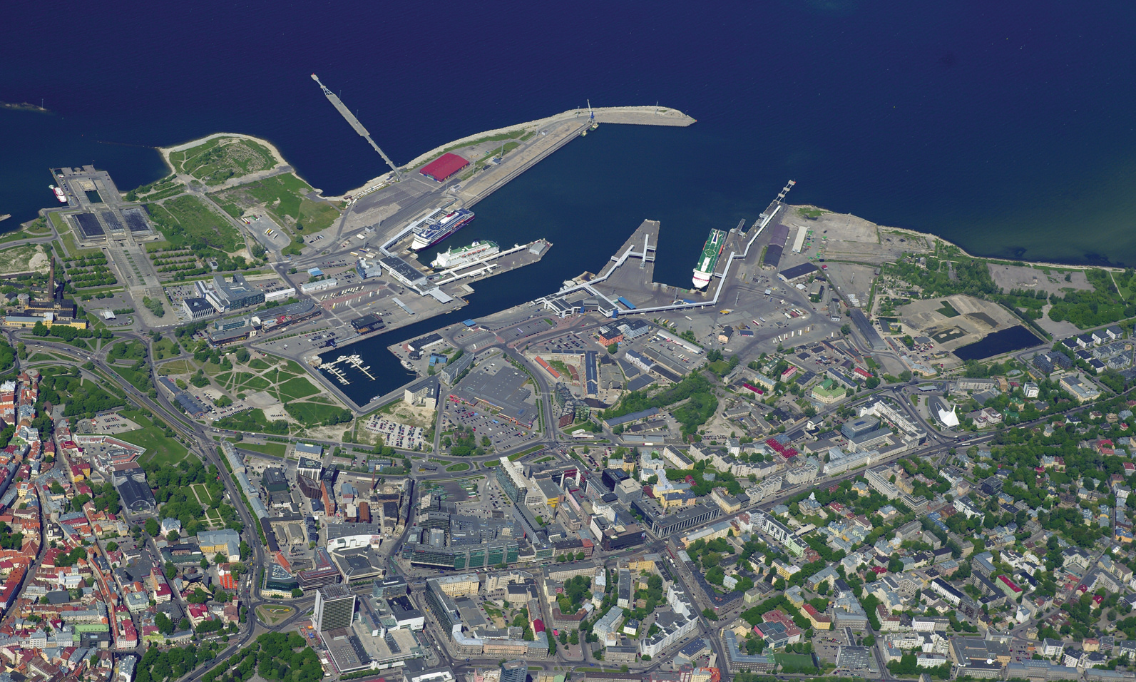 Õhuvaade Sadama asumile